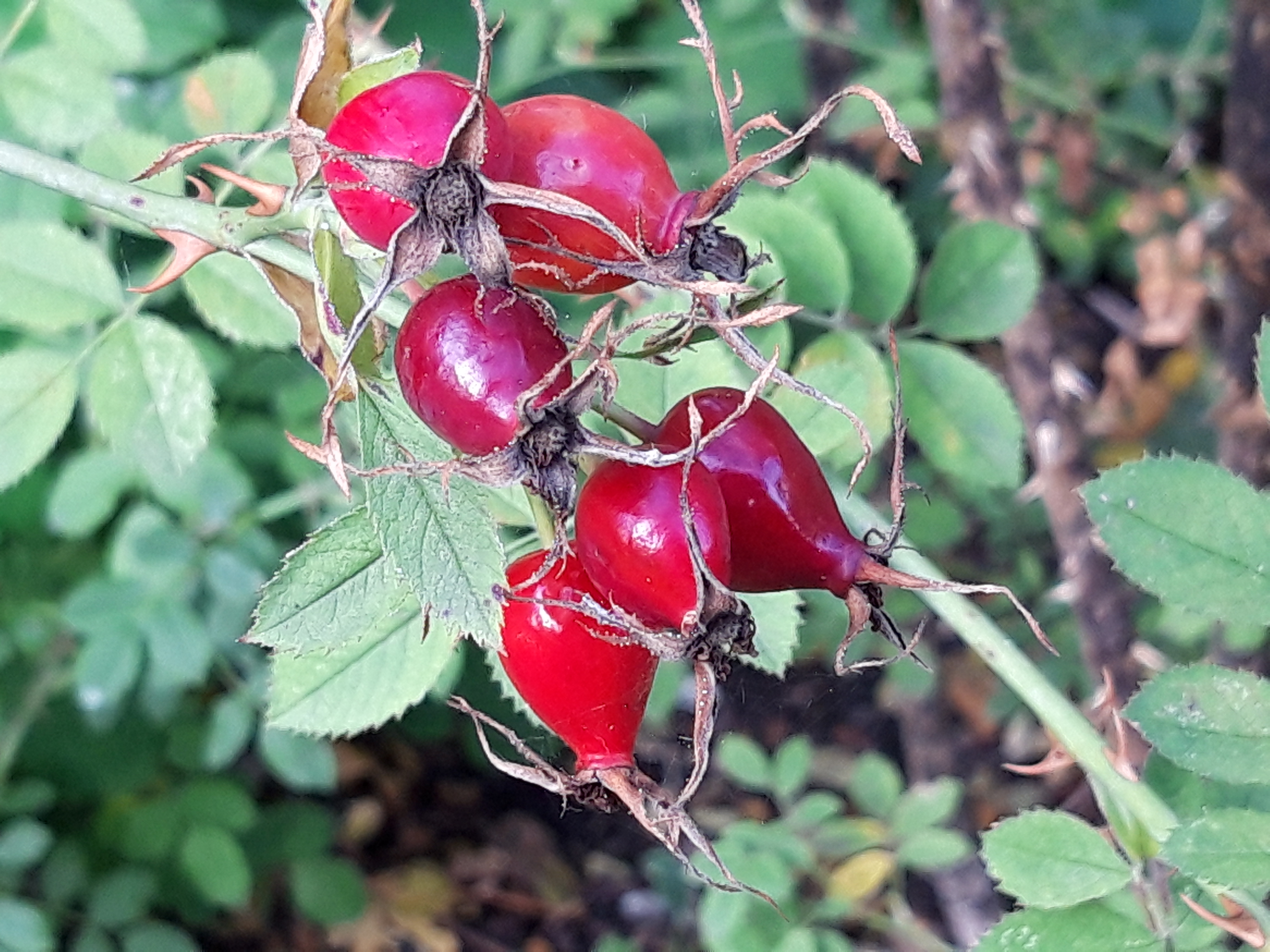 rozebottels van rosa elliptica hortus leiden. Wigbladige roos. september 2018